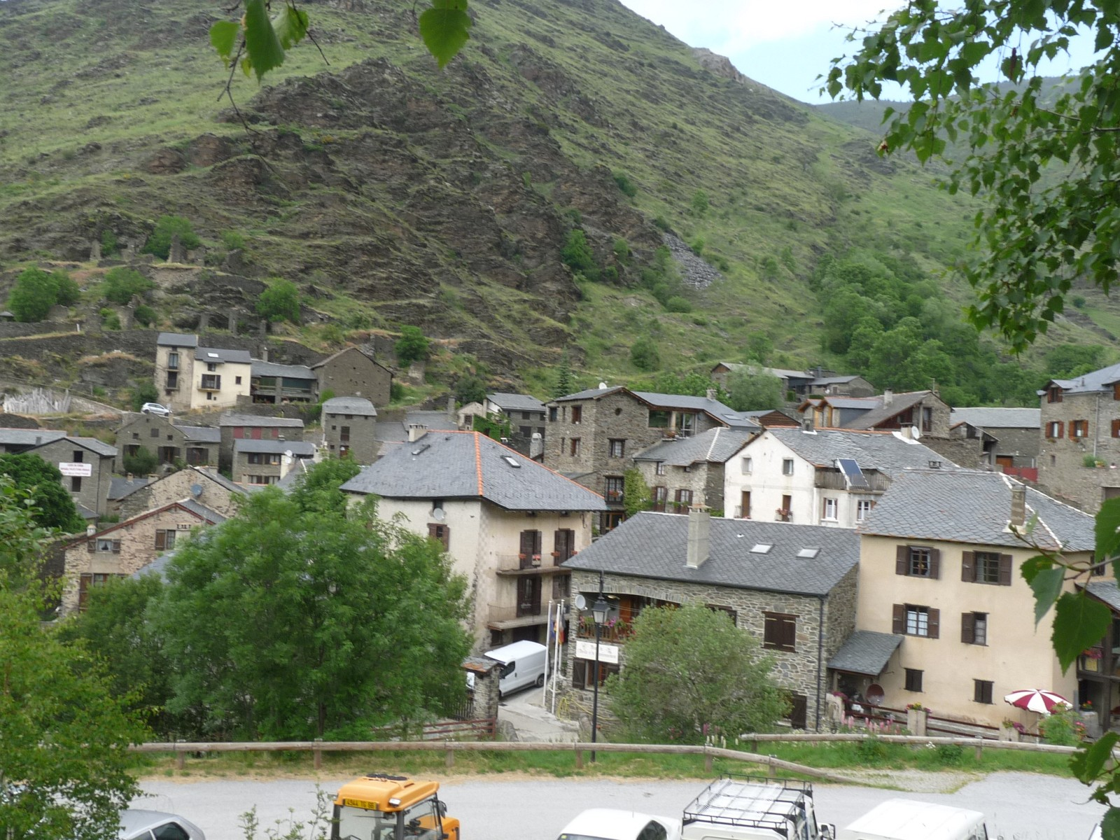 Valcebollère, Pyrénées-Orientales, France